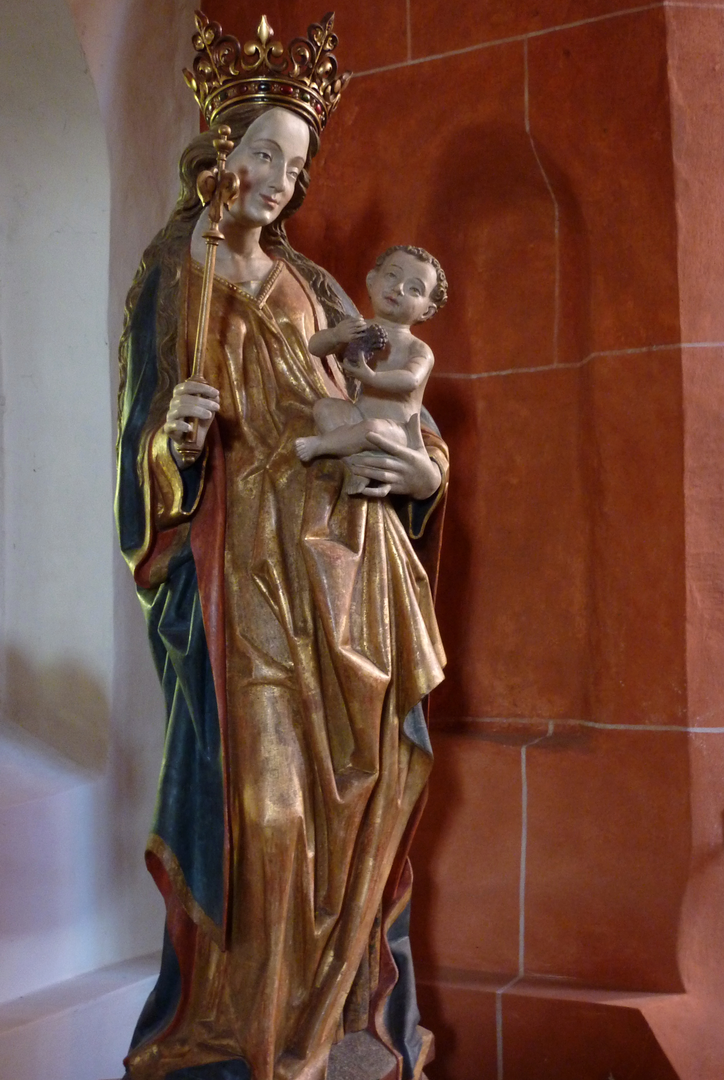 Katholische Filialkirche, ehemalige Klosterkirche St. Georg in Niederwerth im Landkreis Mayen-Koblenz (Rheinland-Pfalz), Madonna mit Kind (Unsere Liebe Frau vom Werth), um 1490/1500, Tilman van der Burch zugeschrieben